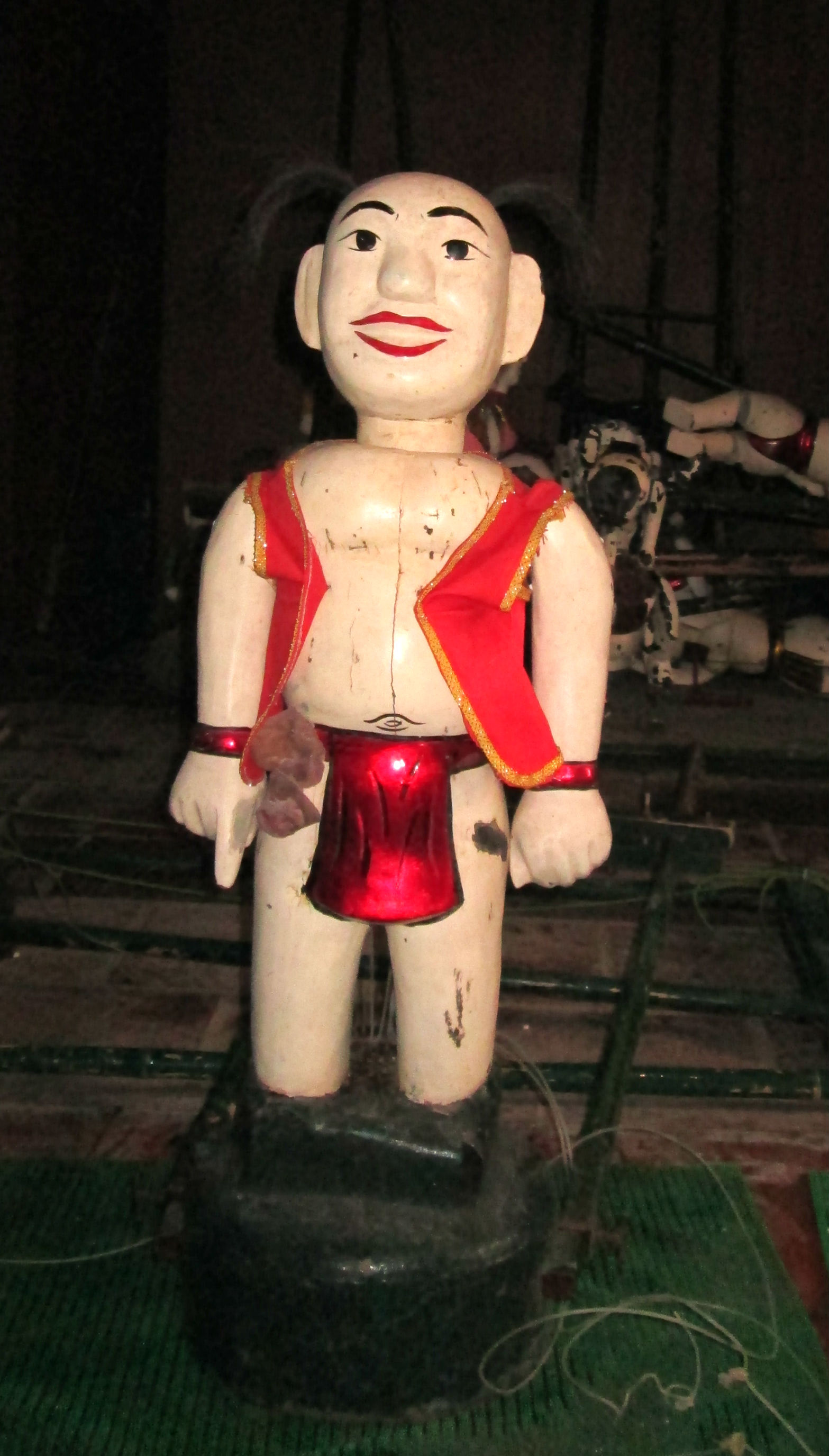 Marionnette Chú Tễu, du Múa rối nước, théâtre de marionnette vietnamien traditionnel.